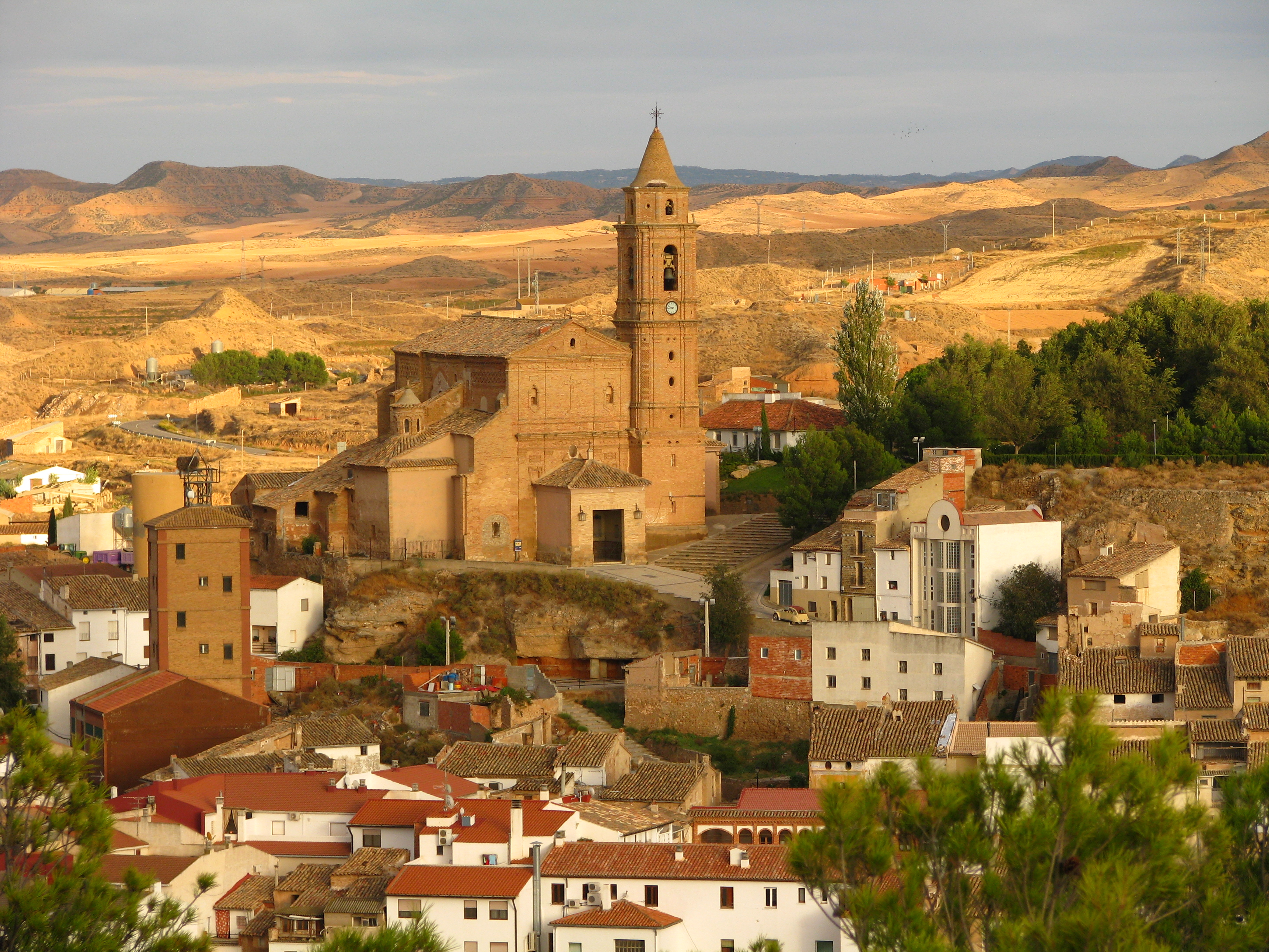 Imagen tomada en la fuente que hay a mitad del camino que sube a la Ermita del Carmen, que también forma parte del patrimonio de la localidad